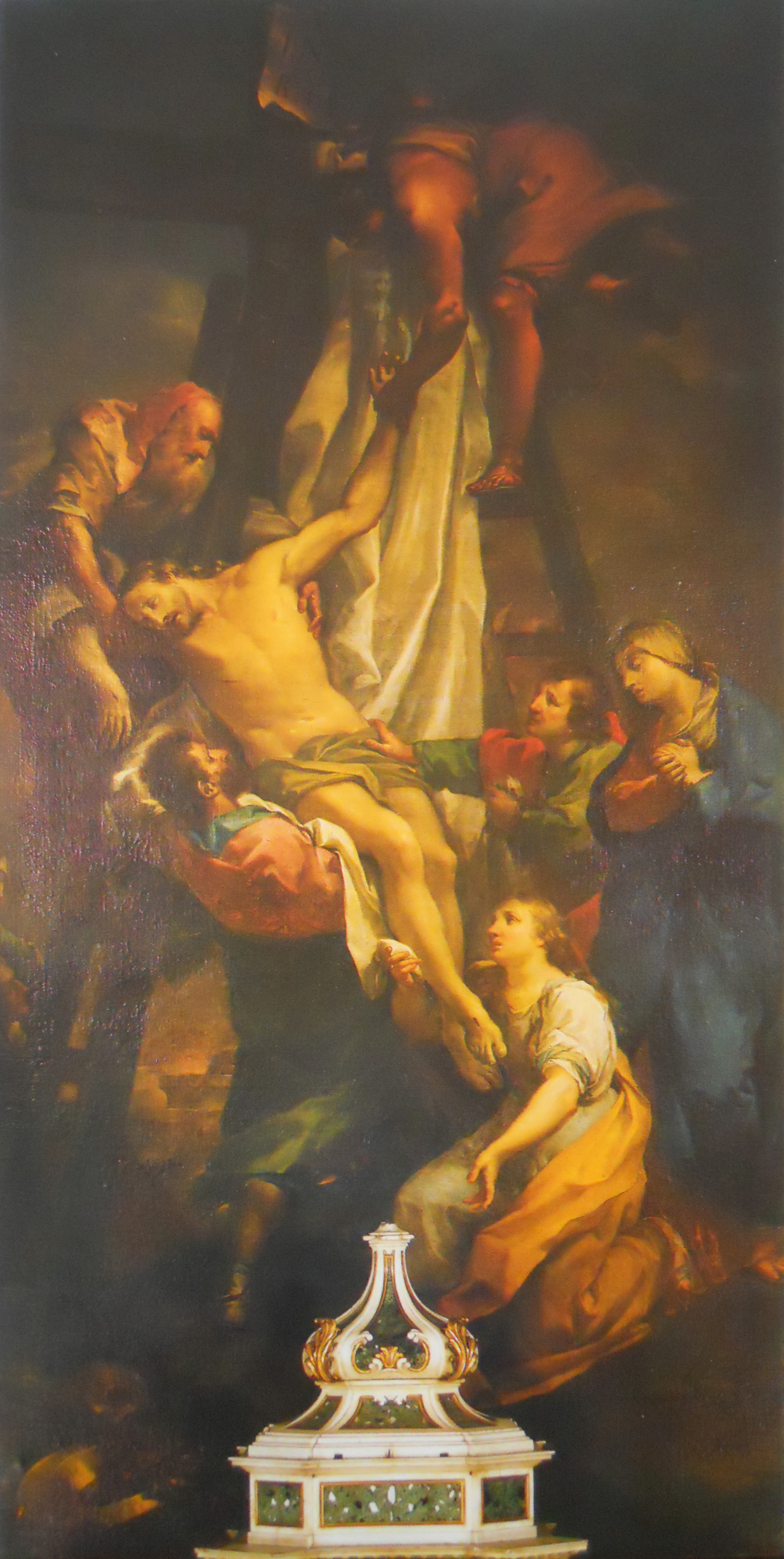 Deposizione di Cristo (Sante Cattaneo)